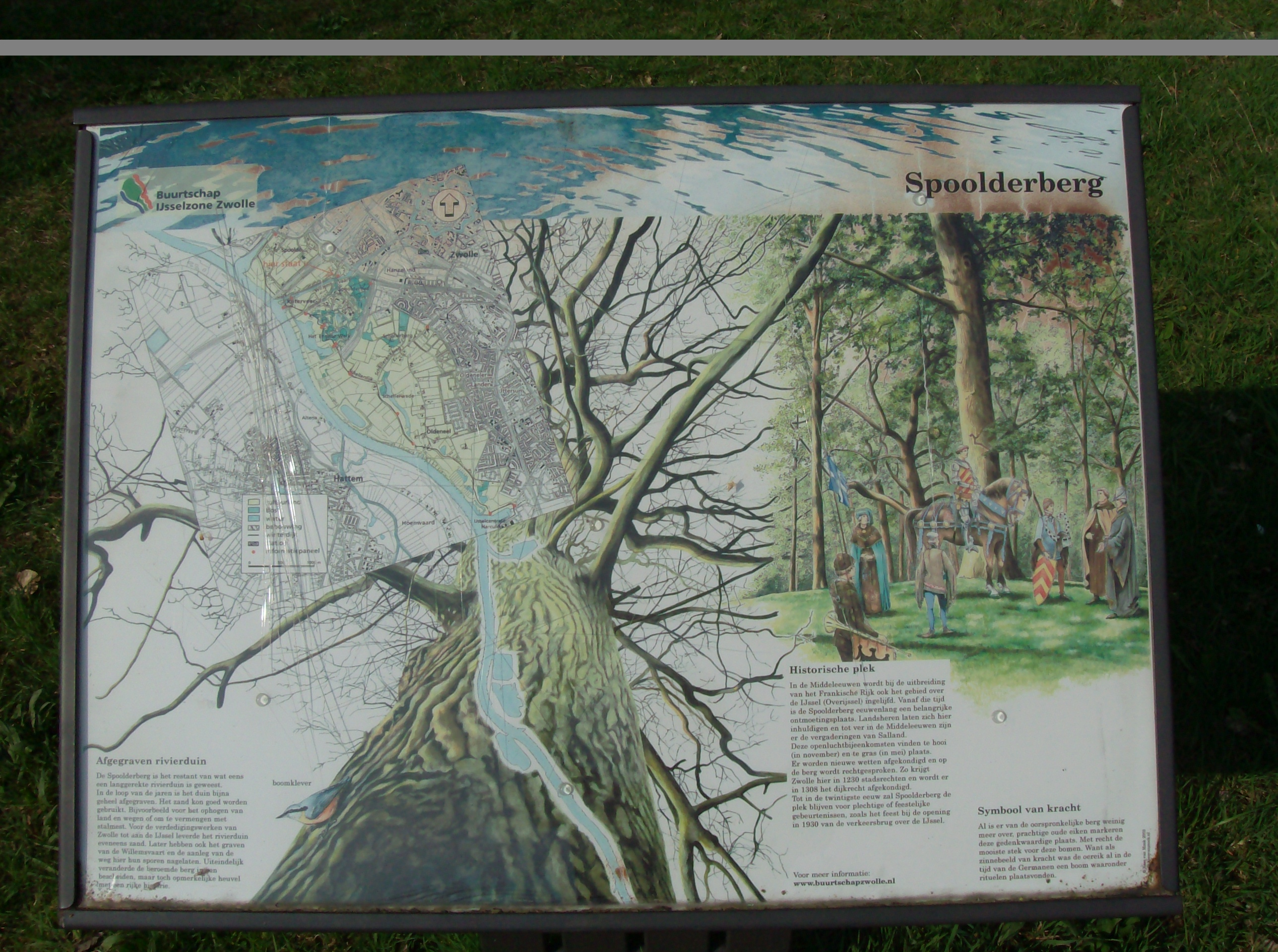 Uitlegbord Spoolderberg van Buurtschap IJsselzone Zwolle.